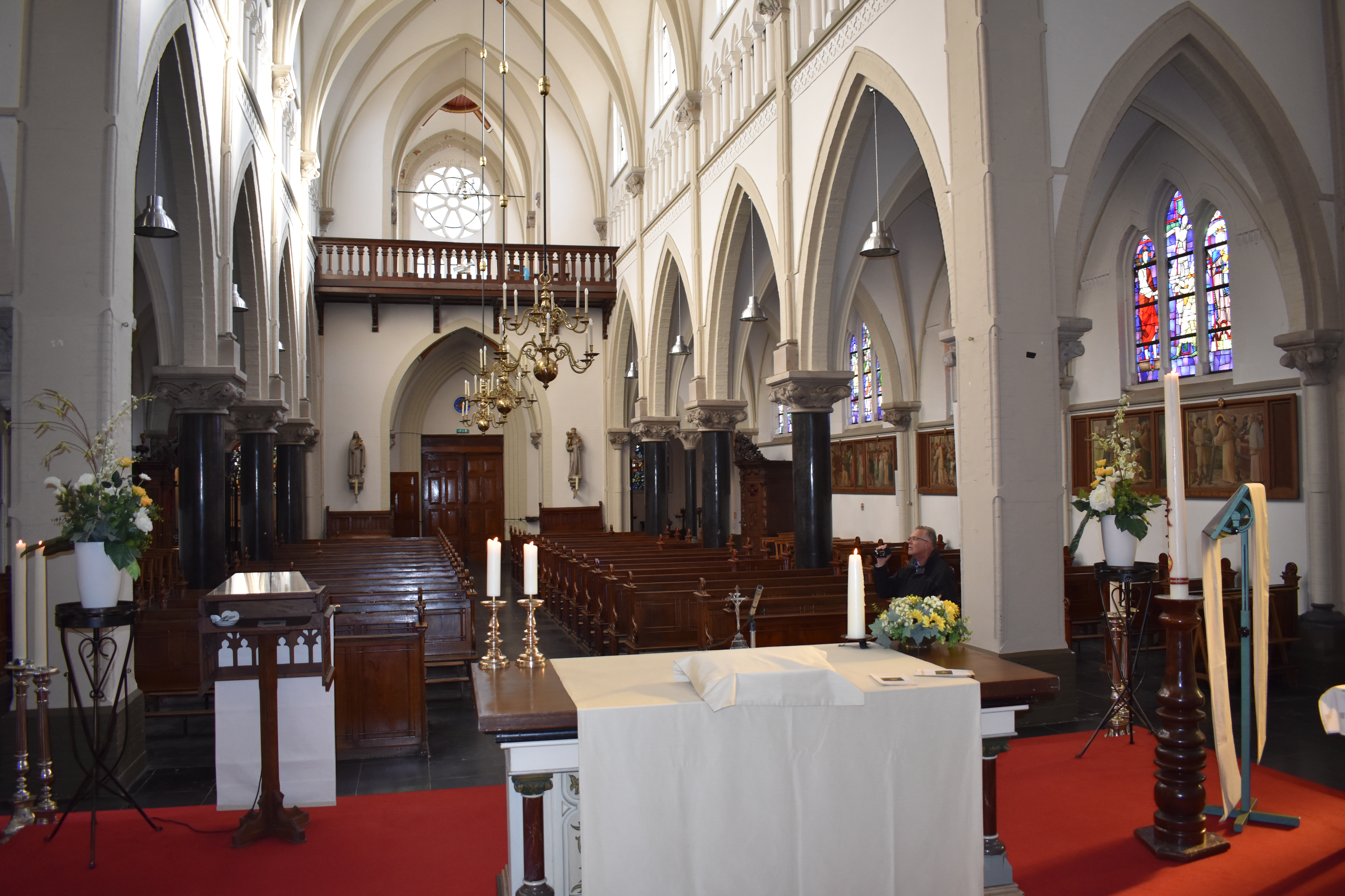 H. Willibrorduskerk, Hoofdstraat 80, 5473 AX, Heeswijk Dinther Wikidata has entry Q3062528 with data related to this item.